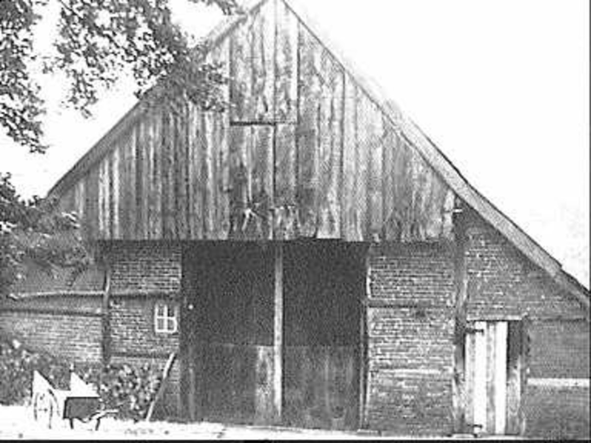 Erve Olde Möllink: achtergevel (opmerking: Deze afbeelding hebben wij helaas alleen in deze lage resolutie.)